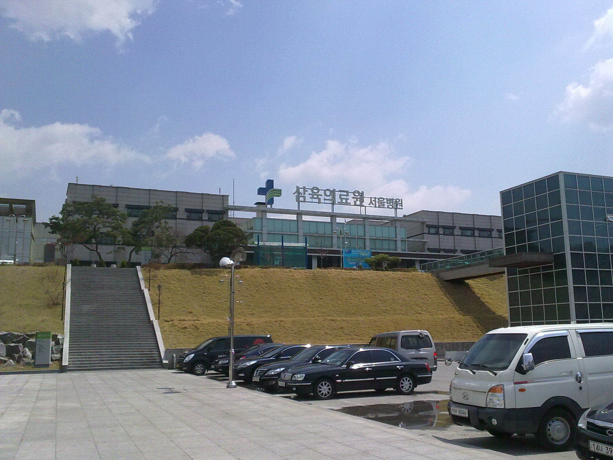 삼육의료원 서울병원